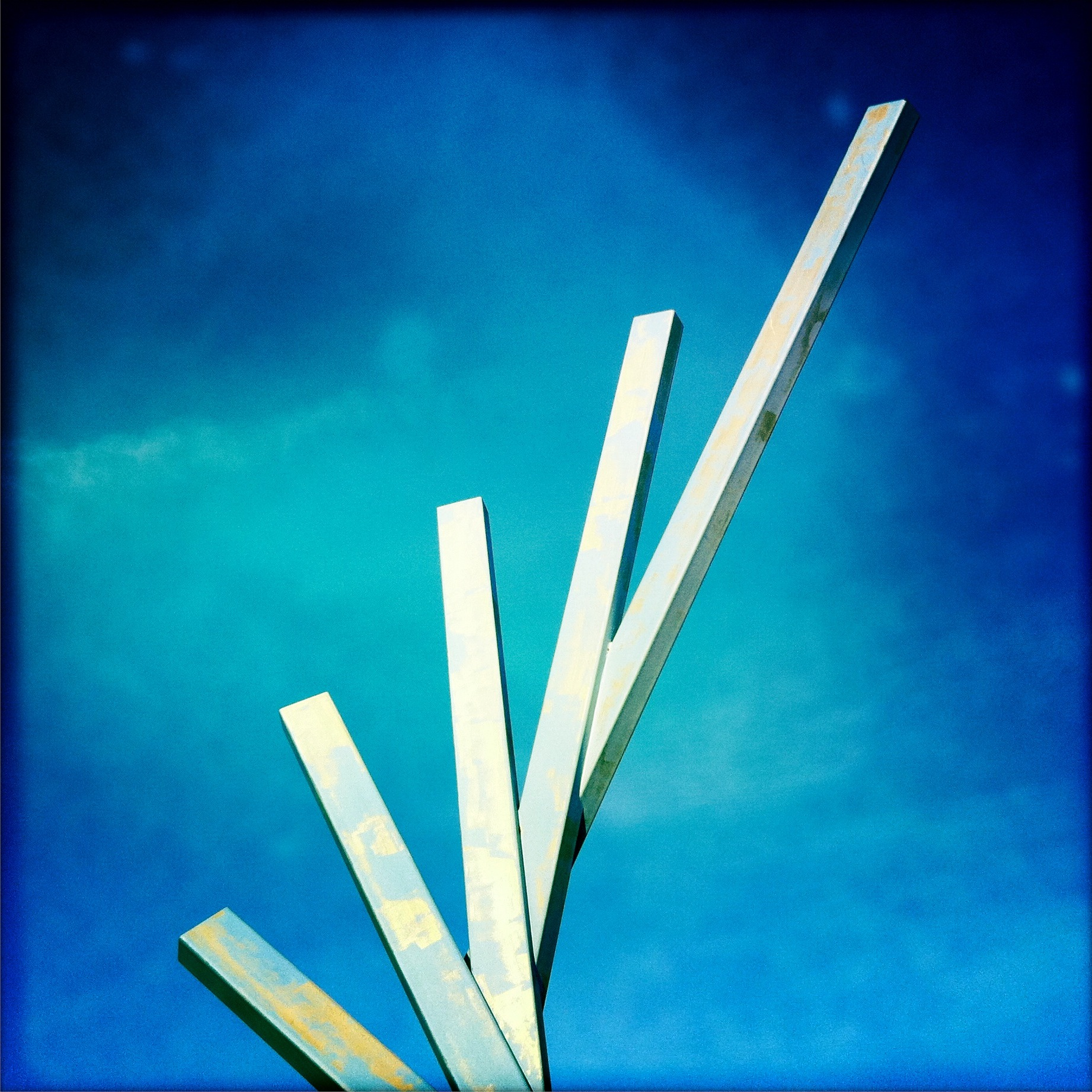 Monument at Haugesund Airport, Karmøy